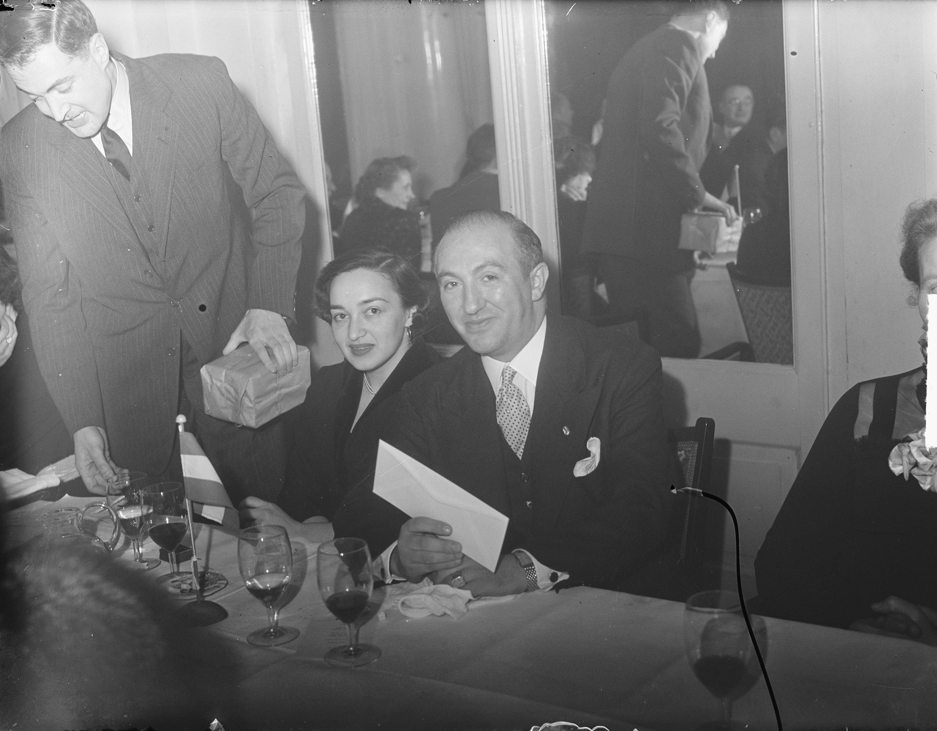 Najdorf en echtgenote, Internationaal Schaaktournooi 1950 Amsterdam